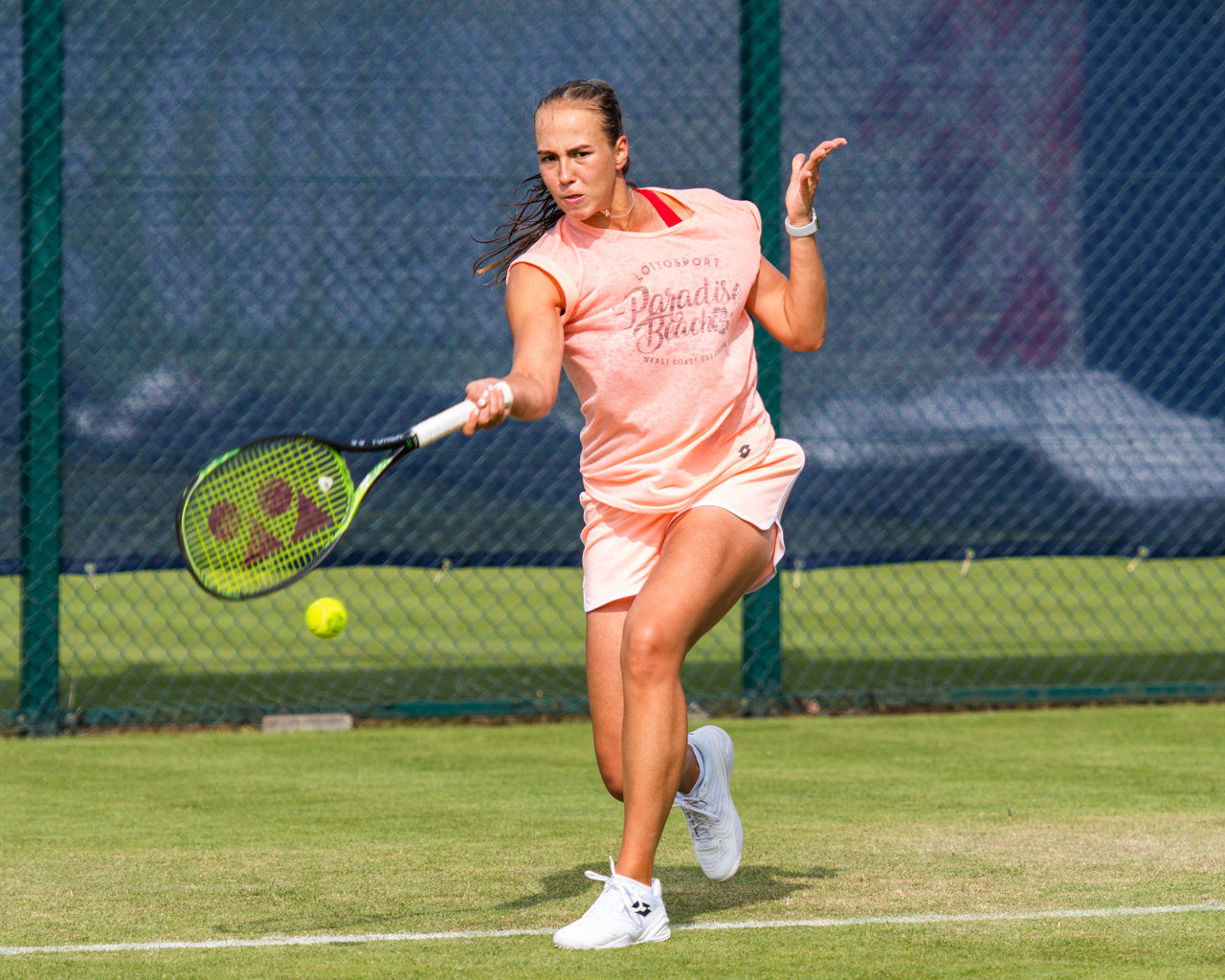 Vera Lapko